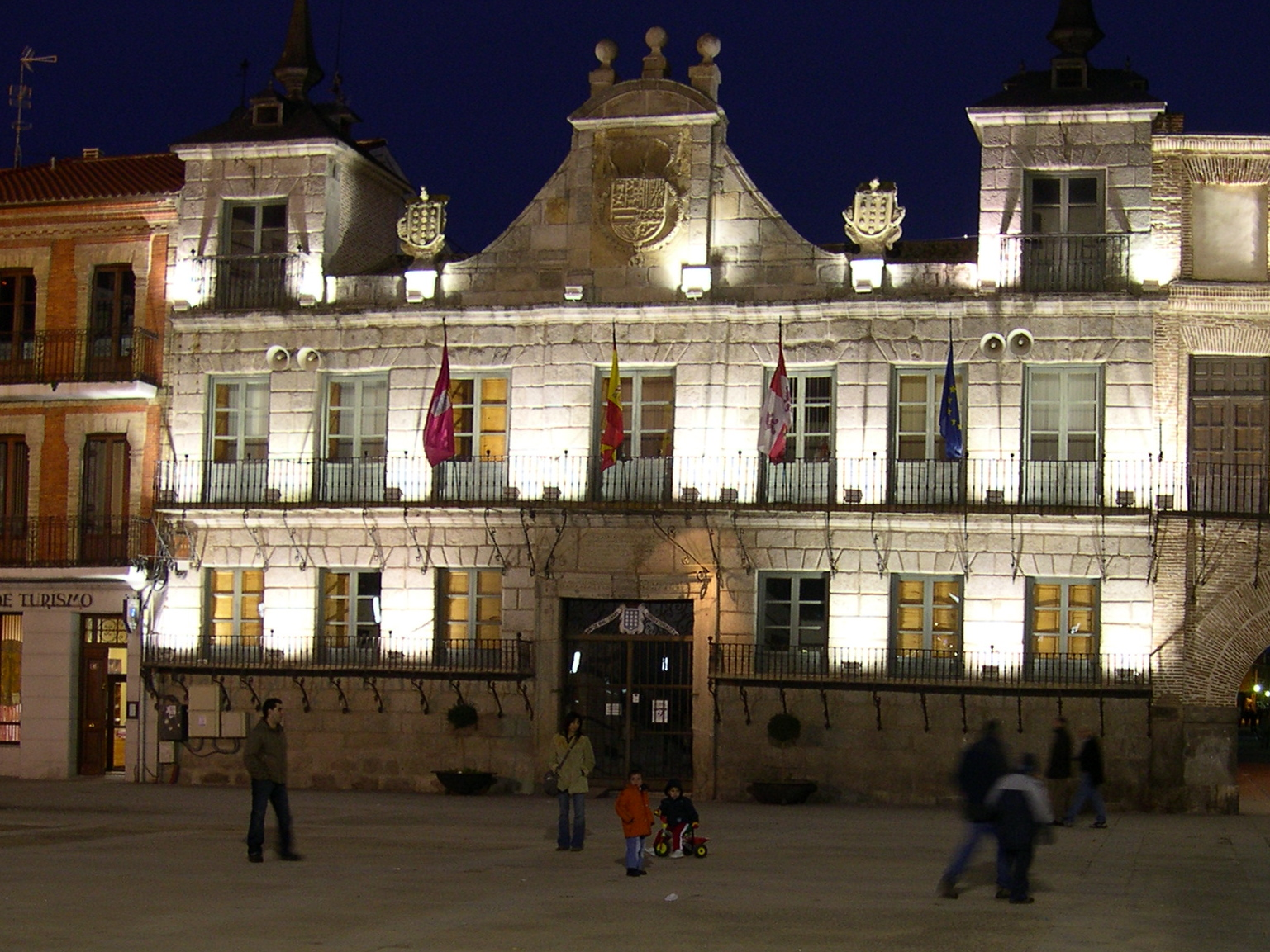 Ayuntamiento de Medina del Campo